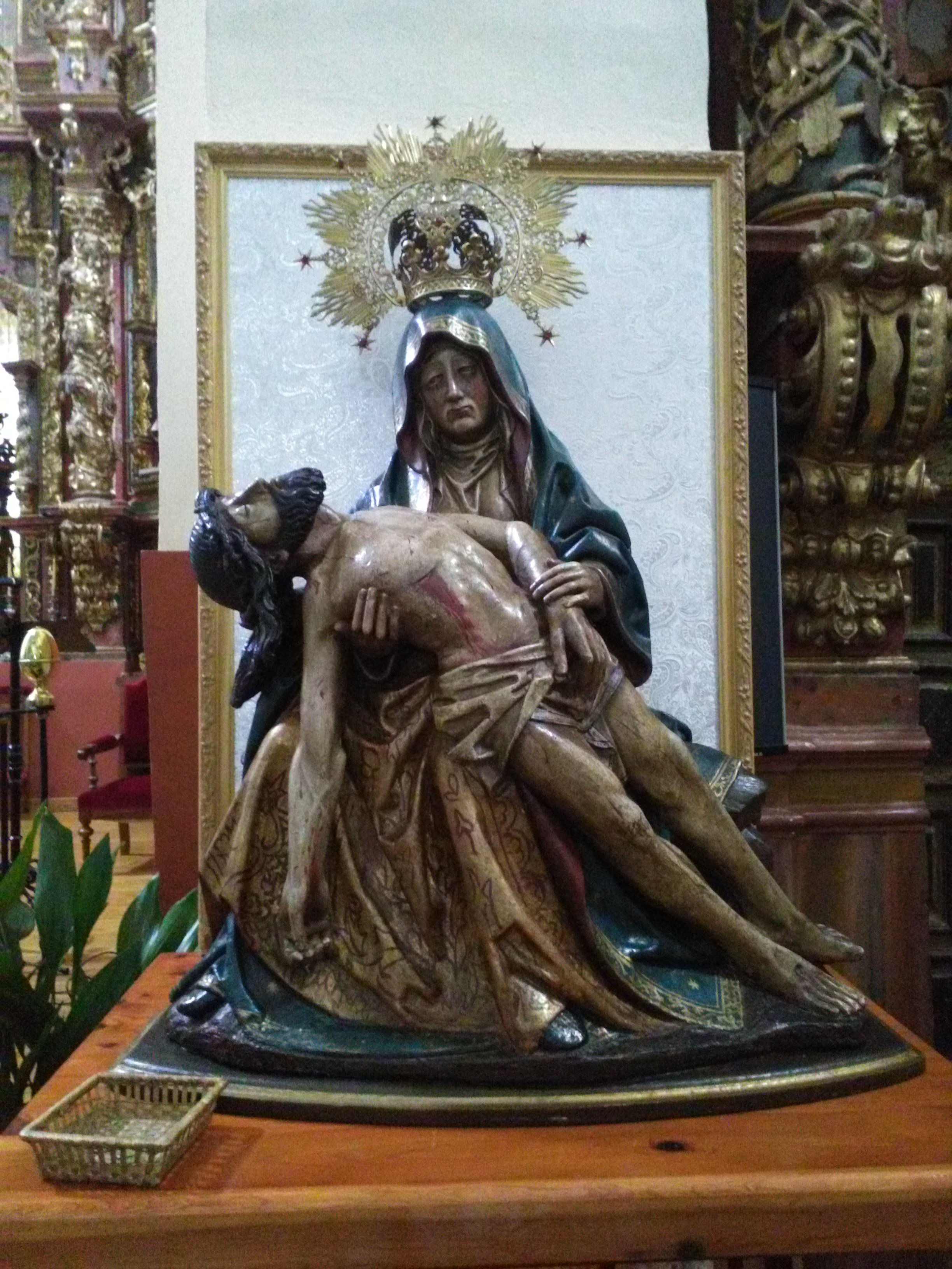 Virgen de la Piedad de Villademor de la Vega. Talla de madera dorada y policromada de estilo gótico hispano flamenco y autor desconocido, fechada en el siglo xv o xvi.